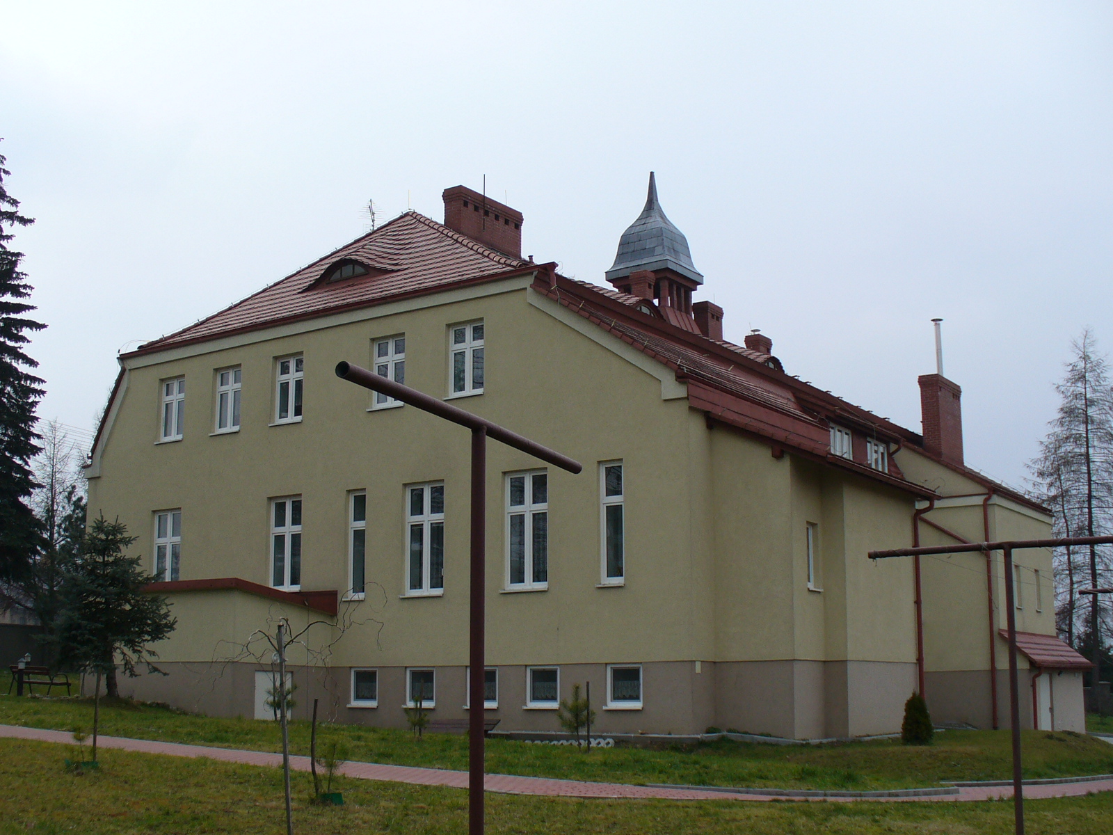 Bełk. Dawny szpital, obecnie dom spokojnej starości – po remoncie.